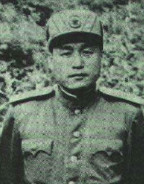 리상조 (1913-1998)